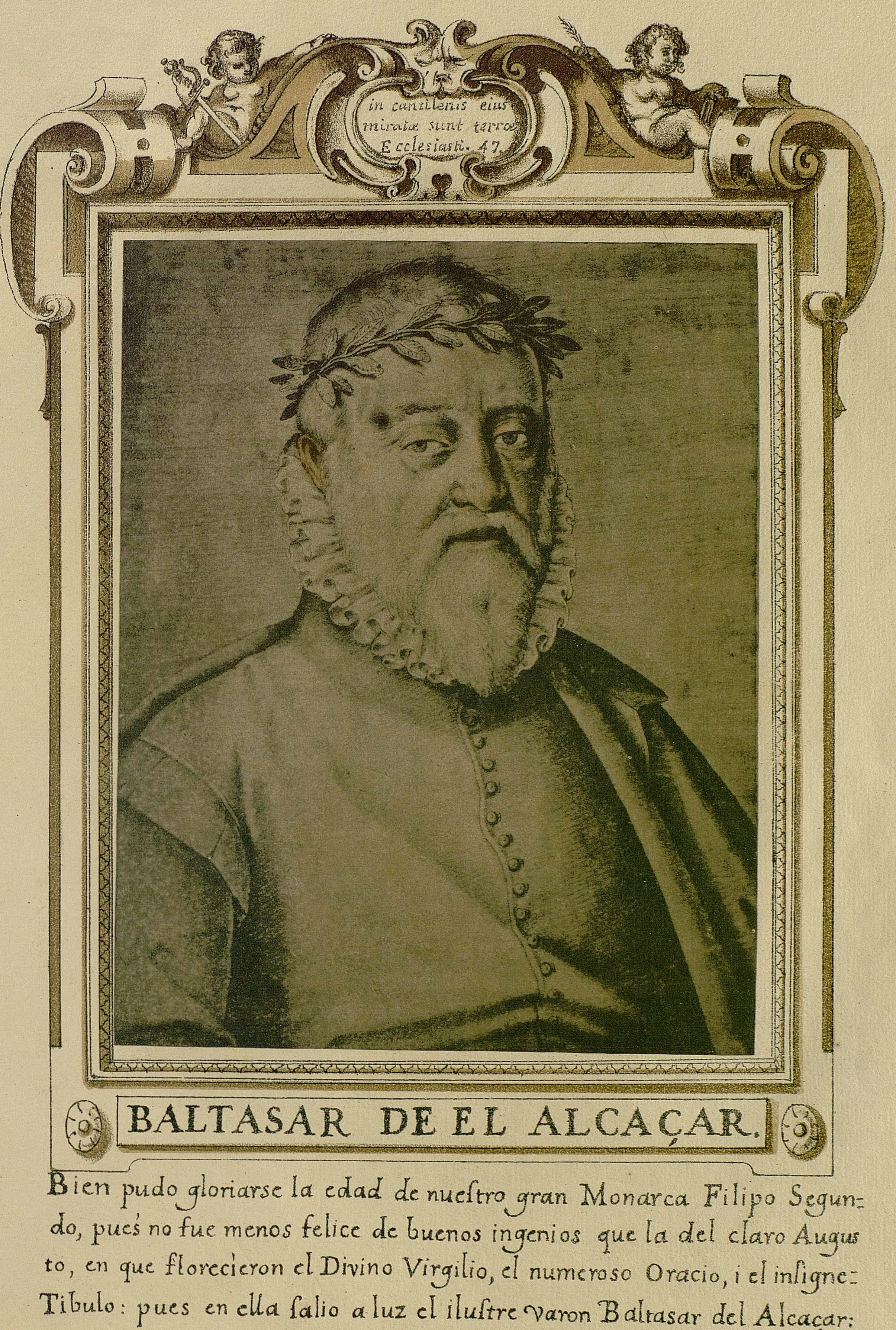 Baltasar del Alcázar, Libro de descripción de verdaderos retratos de ilustres y memorables varones, Madrid, Biblioteca de la Fundación Lázaro Galdiano